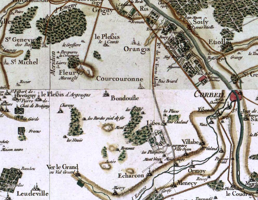 Carte de Courcouronnes au XVIIIe siècle par Cassini.